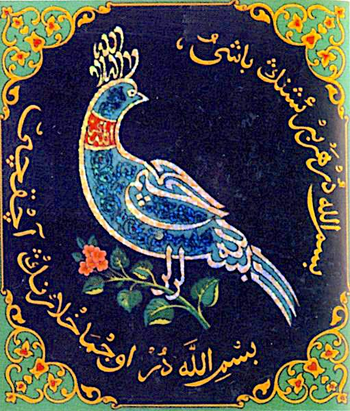 Наджип Наккаш. Басмала. 2003. Стекло, акрил, тушь, масло, фольга